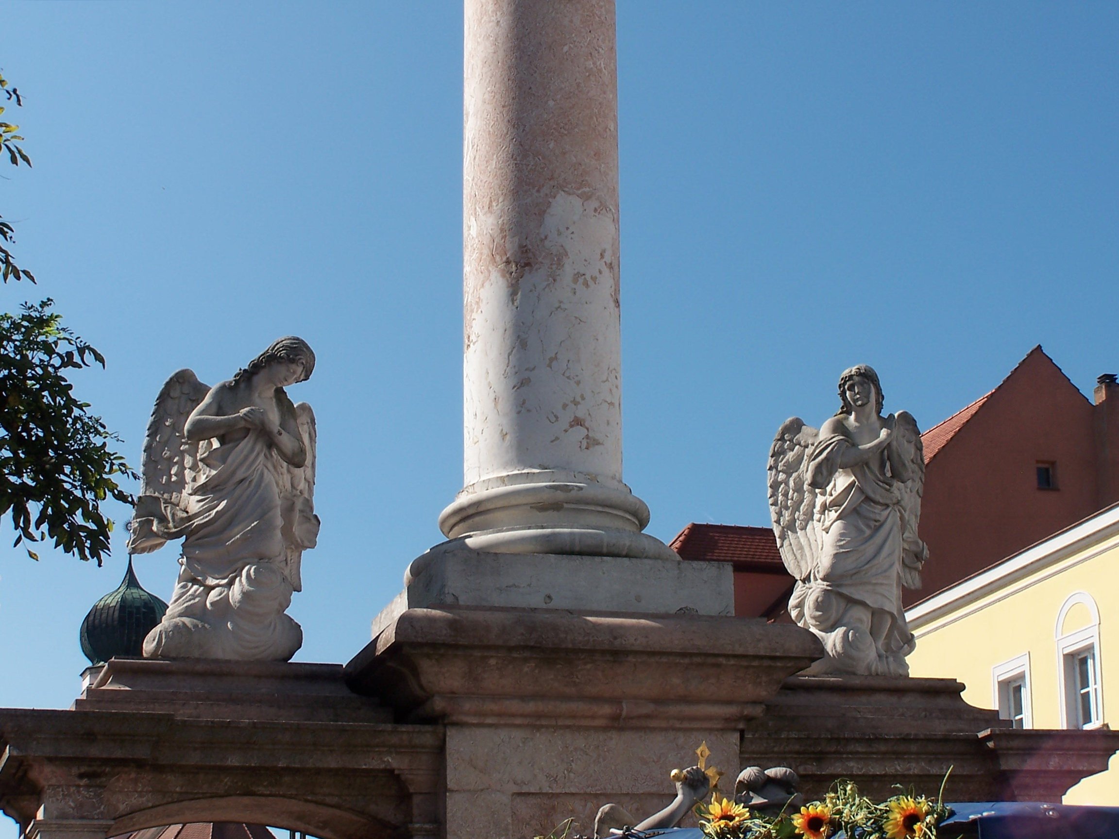 Straubing, Theresienplatz, Dreifaltigkeitssäule. Korinthische Säule mit Skulptur der heiligen Dreifaltigkeit, Postament mit Kolonnadenrahmung und Engelskulpturen, mit umgebender Balustrade, Marmor, 1704-09.